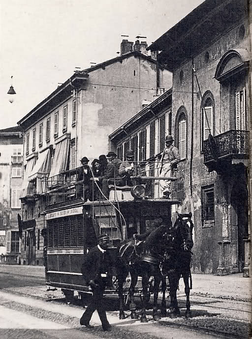 Tram a cavalli della linea Milano-Monza, a Milano in corso Venezia